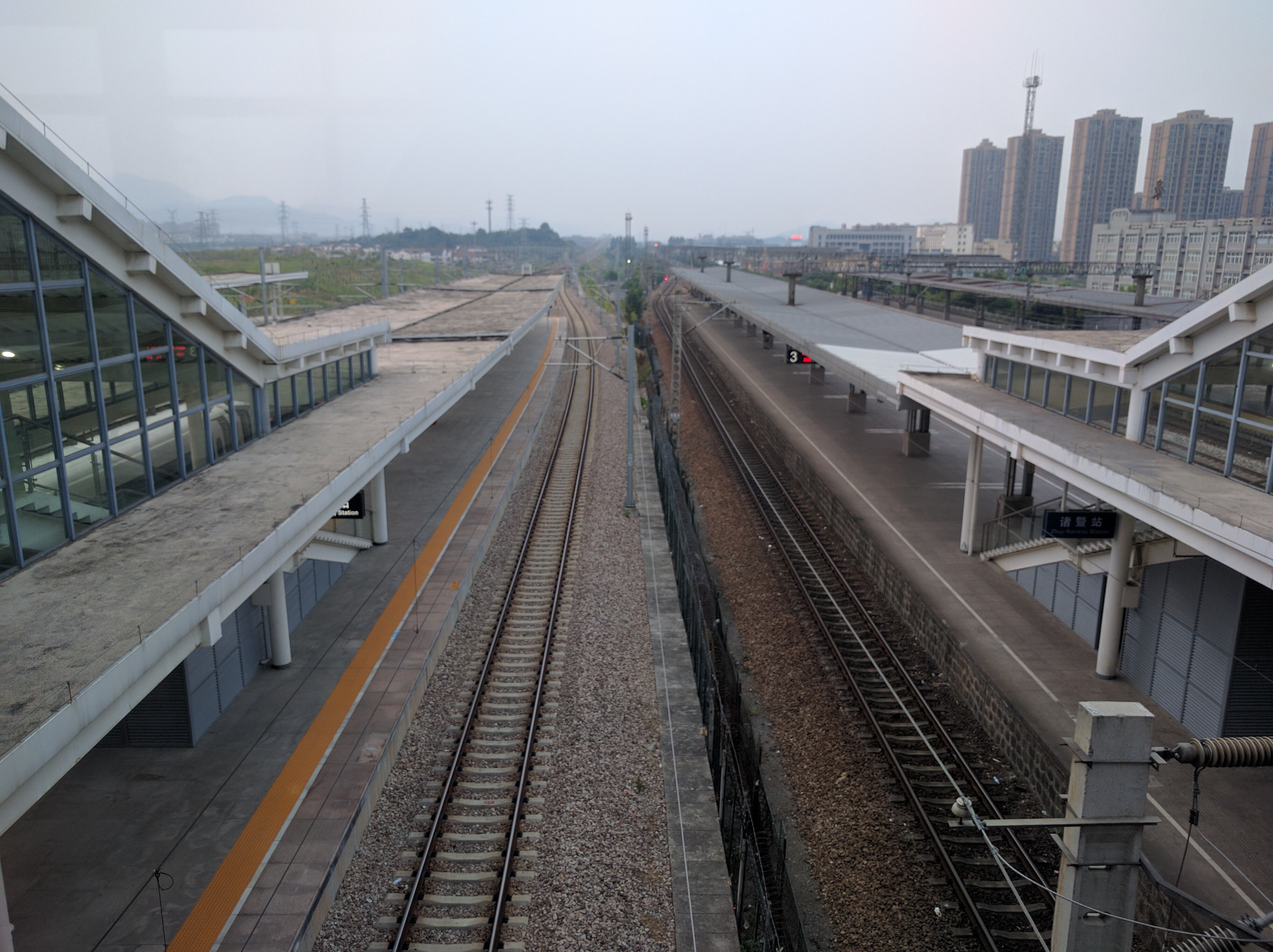 中文（中国大陆）: 诸暨火车站